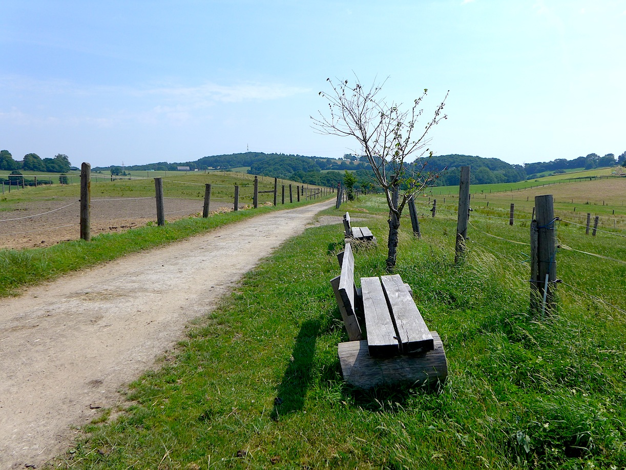 Этап "Невигес-Нордрат" маркированного турмаршрута "Тропа Неандерланд", Северный Рейн-Вестфалия, Германия.